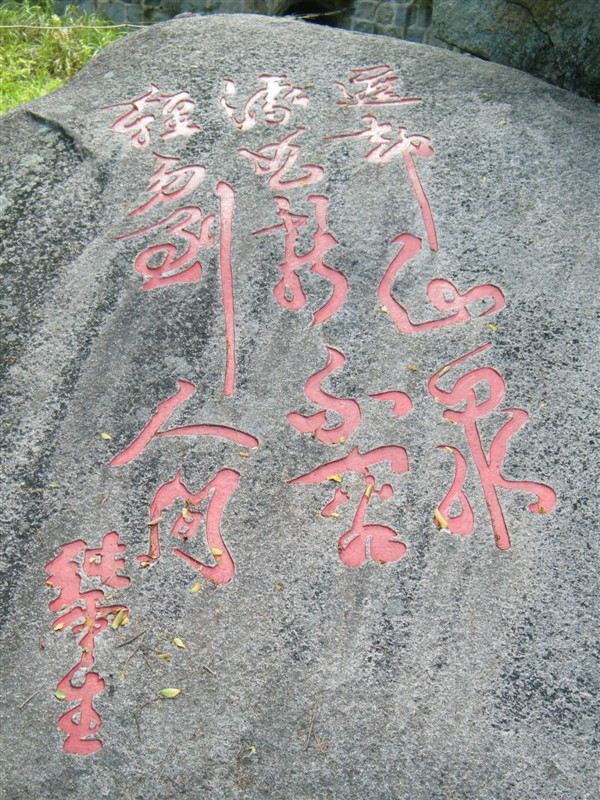 遮却山泉流曲折，不容经易到人间 张国栋